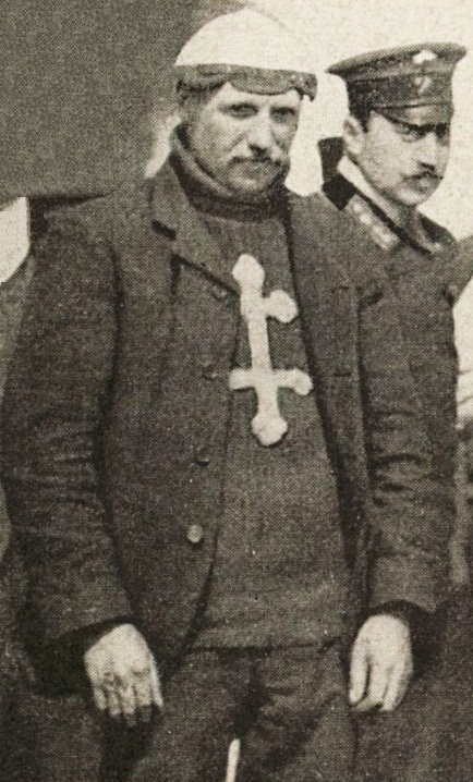 Arthur Duray vainqueur de Saint-Pétersbourg-Moscou 1907 sur Lorraine-Dietrich 60 hp (après l'arrivée à Moscou). Il porte son habituel pull-over avec l'écusson de la Croix de Lorraine cousu - La Vie au Grand Air - 22 juin 1907, p.429 (course dite des "Voitures françaises")